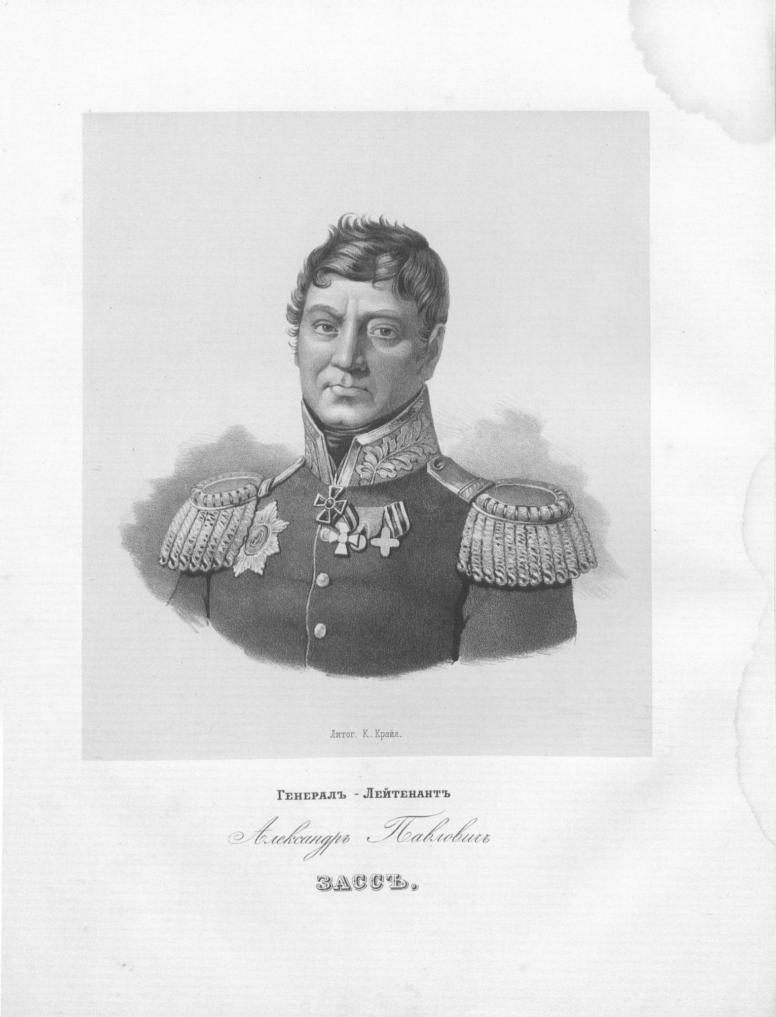 Портрет Андрея Андреевича Засса (ошибочно приписан Александру Павловичу Зассу)